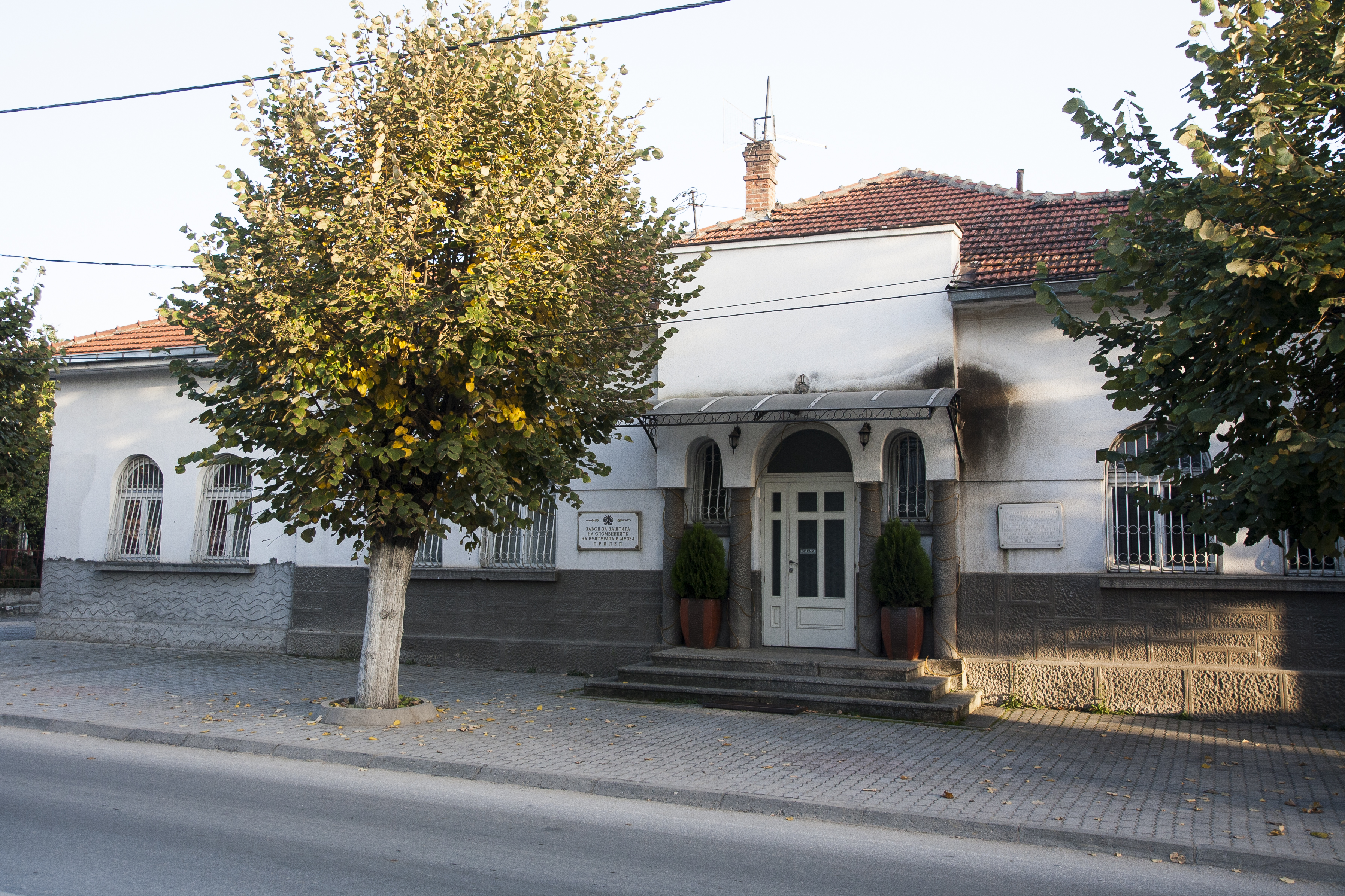 “НУ ЗЗСК и МУЗЕЈ ПРИЛЕП“